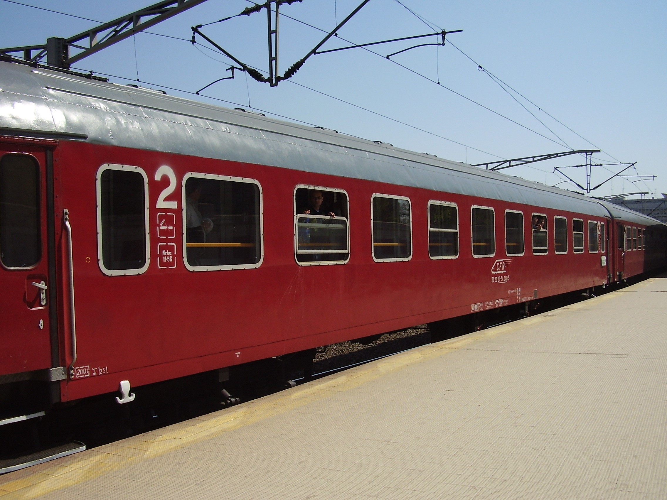 Vagon clasa 20-54, folosit pentru trenuri accelerate şi rapide.